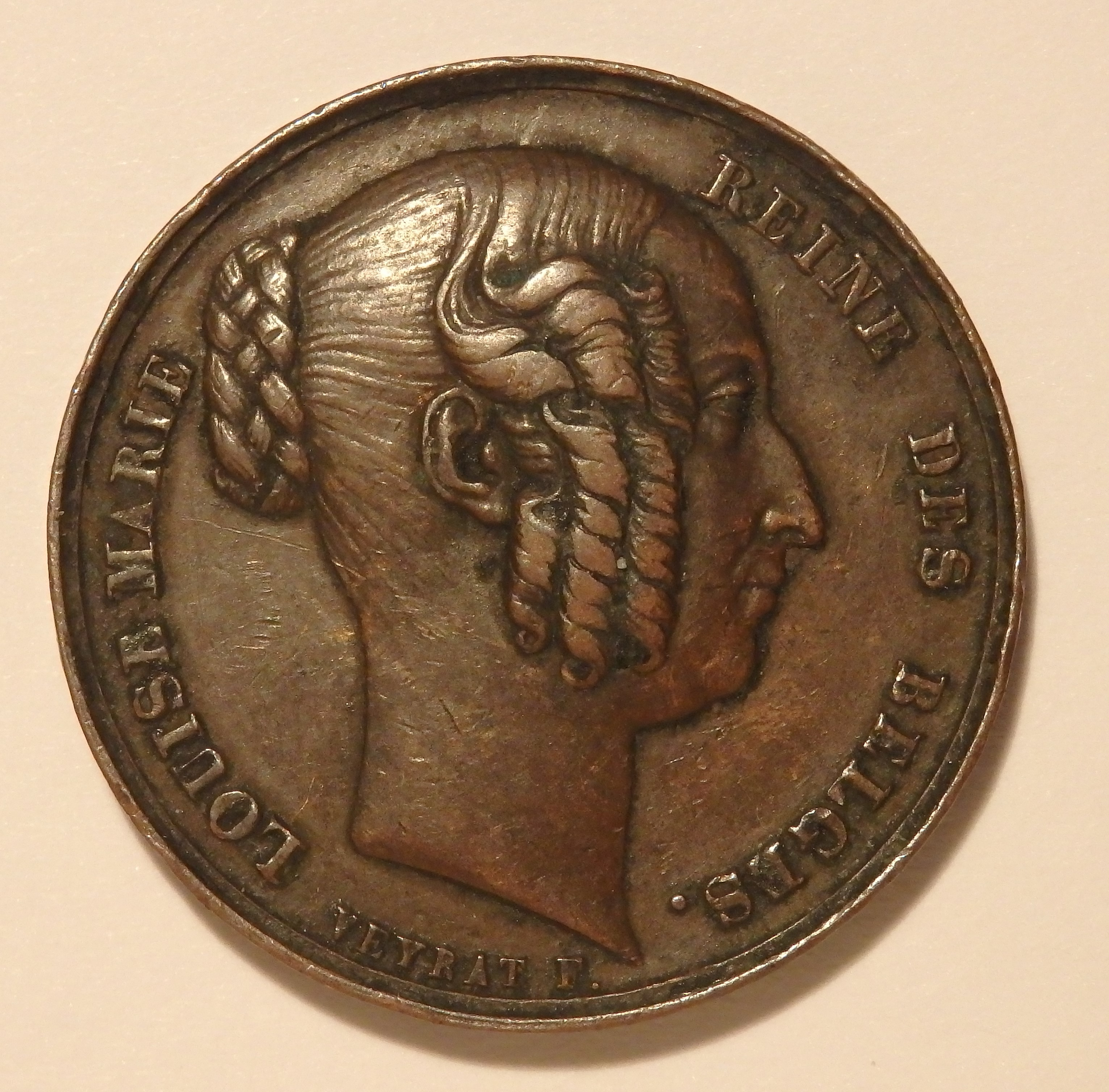 Medaille auf den Tod von Louise Marie